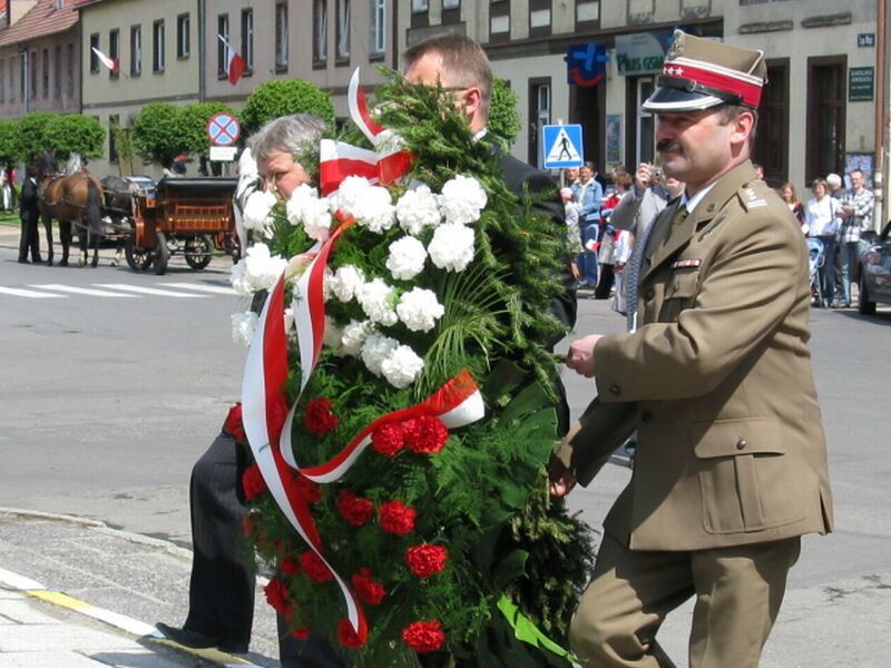 Składanie wieńca podczas Parady Konstytucji 3 maja